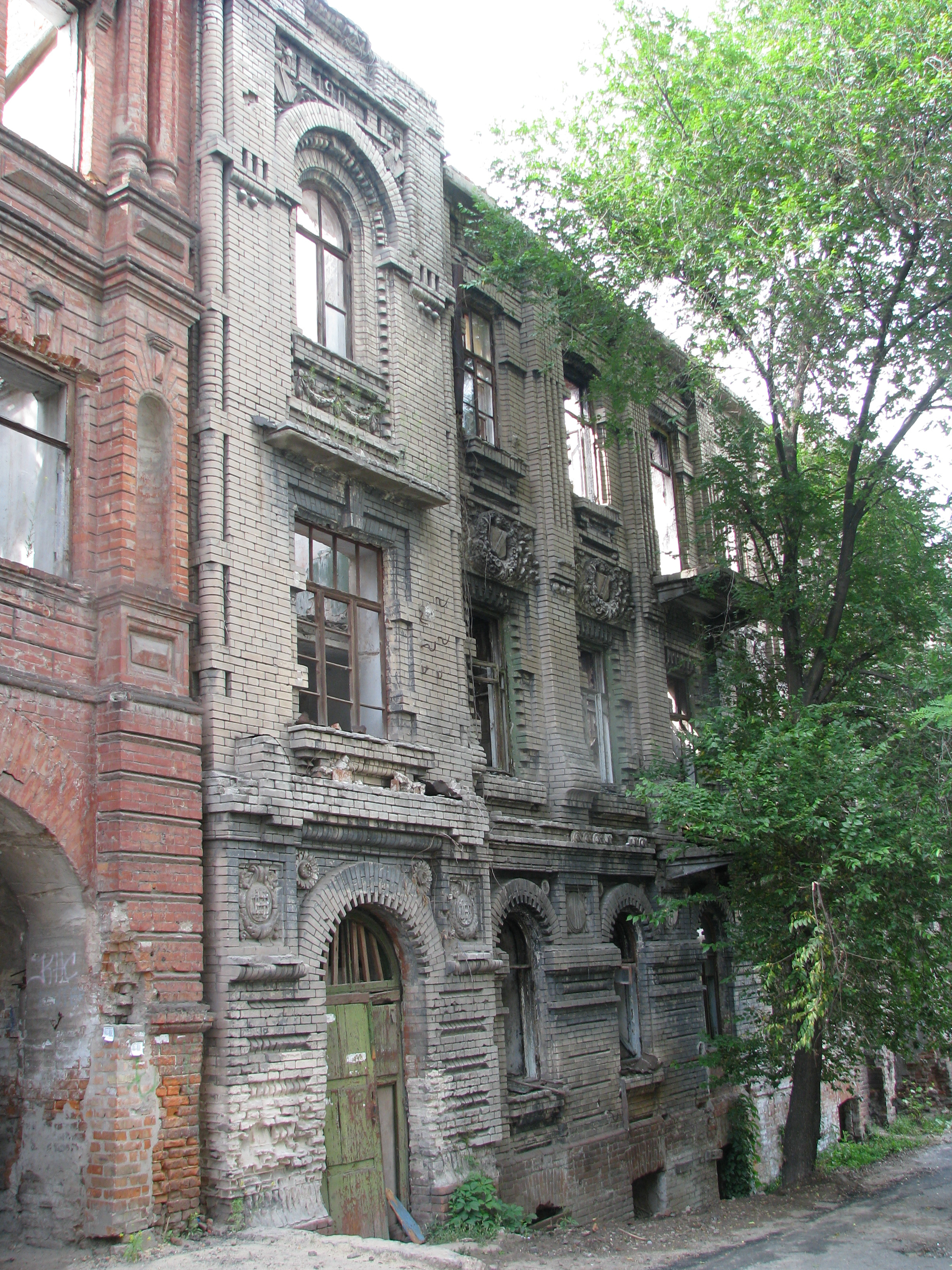 Доходний будинок, Дніпропетровськ, Артема вул., 24 Кирпичный стиль, неоренессанс. Дом заброшен с 2006 г., руинирован.